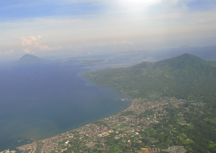 manado, north sulawesi